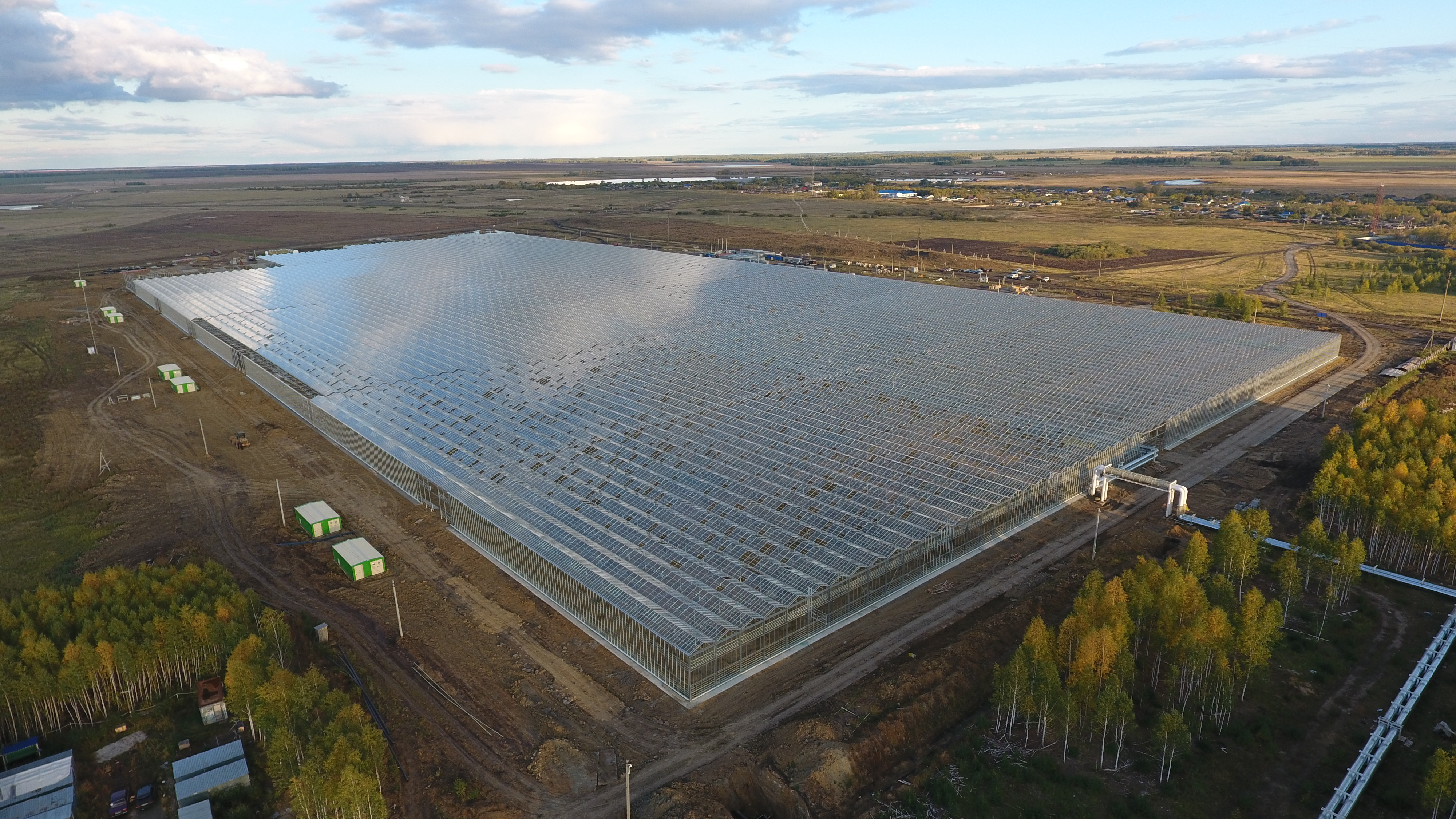 Производственная площадка Агрокомплекс "Мартыновский"